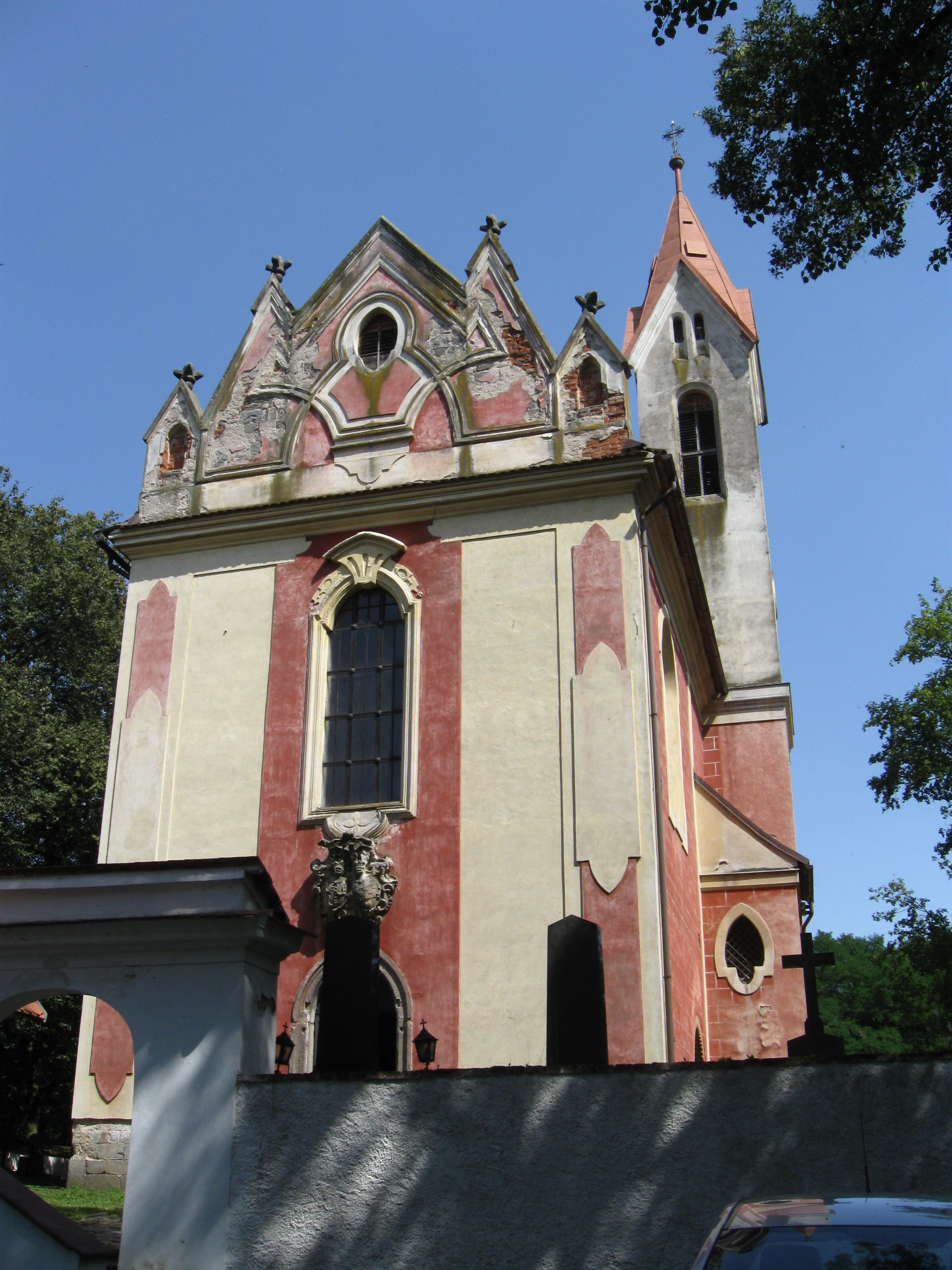 Kostel sv. Havla (Poříčí nad Sázavou), náves, Poříčí nad Sázavou